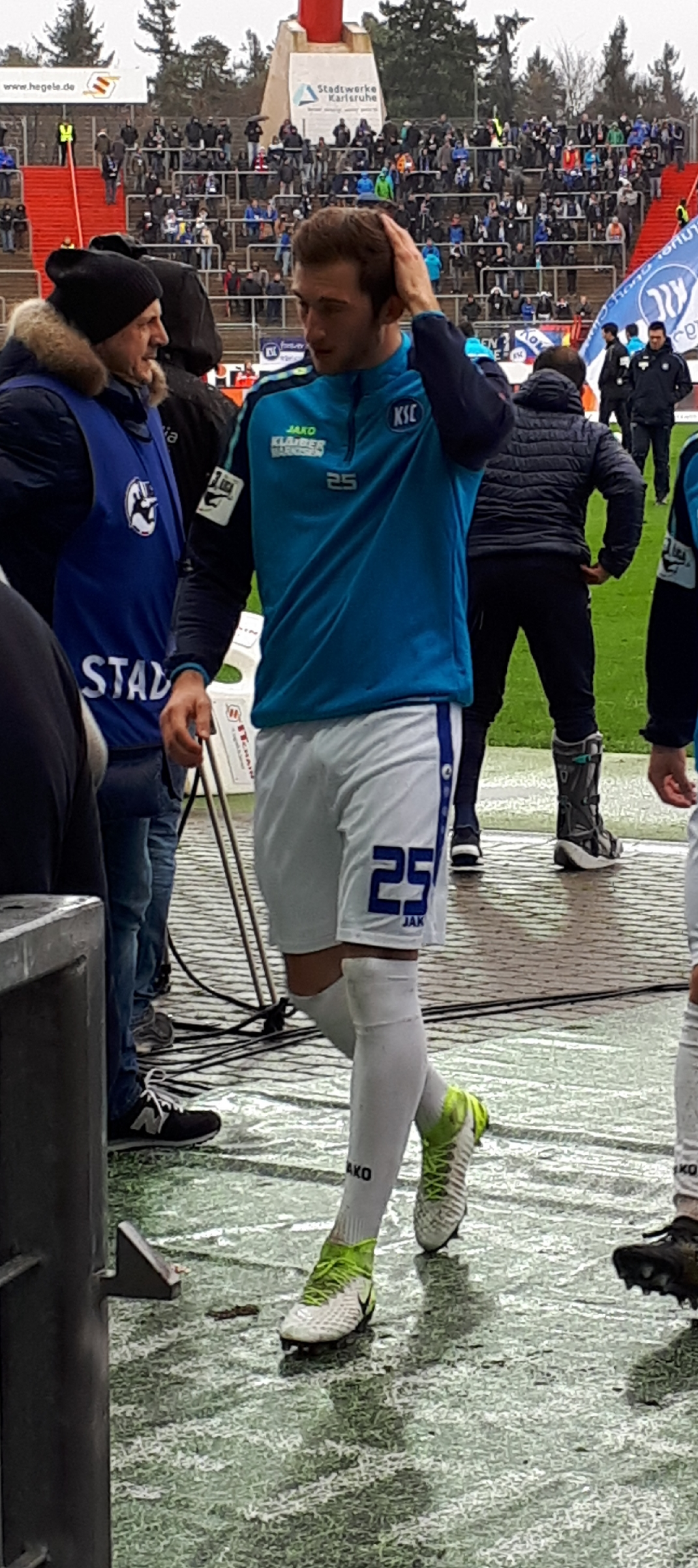 Fußballspieler Jonas Föhrenbach beim Heimspiel des Karlsruher SC gegen die SpVgg Unterhaching am 20. Januar 2018.